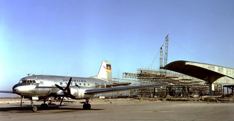 Berlin-Schönefeld, Flughafenbau, Il14 Flugplatz Schönefeld [Berlin-Schönefeld.- Bau des Flughafens.- Flugzeug Iljuschin Il-14 der Fluggesellschaft "Interflug" (DM-SBA) auf Rollfeld stehend]